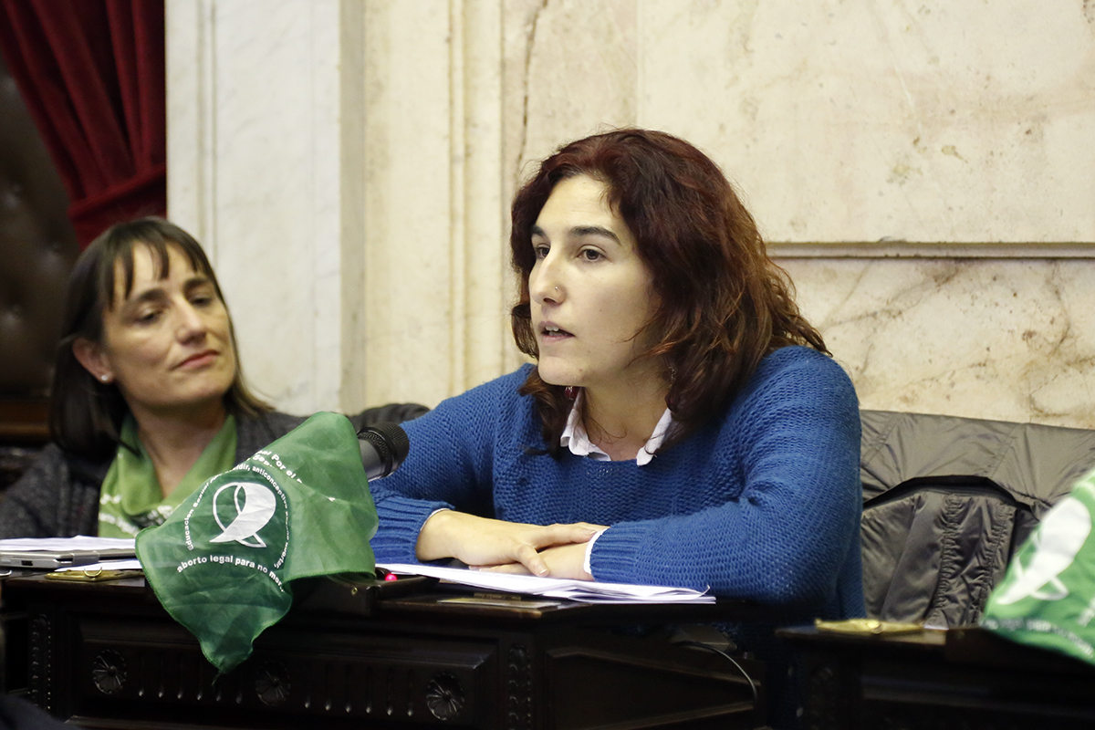 Sesión de la Cámara de Diputados Argentina por la despenalización del aborto. Diputada Gonzalez Seligra.